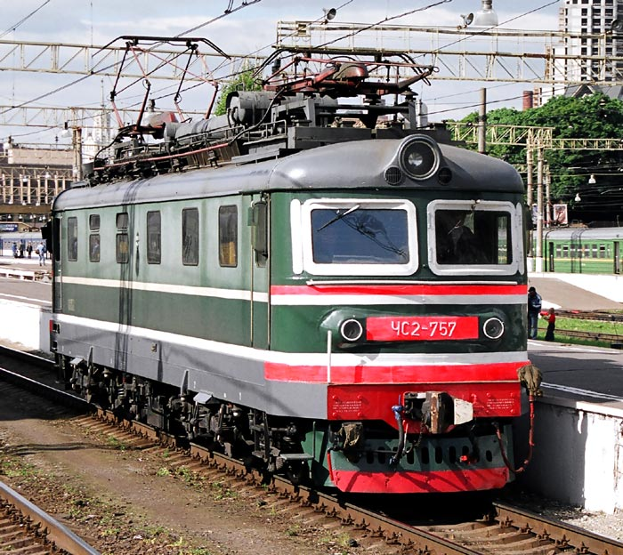 Электровоз ЧС2-757 на Павелецком вокзале (Москва)